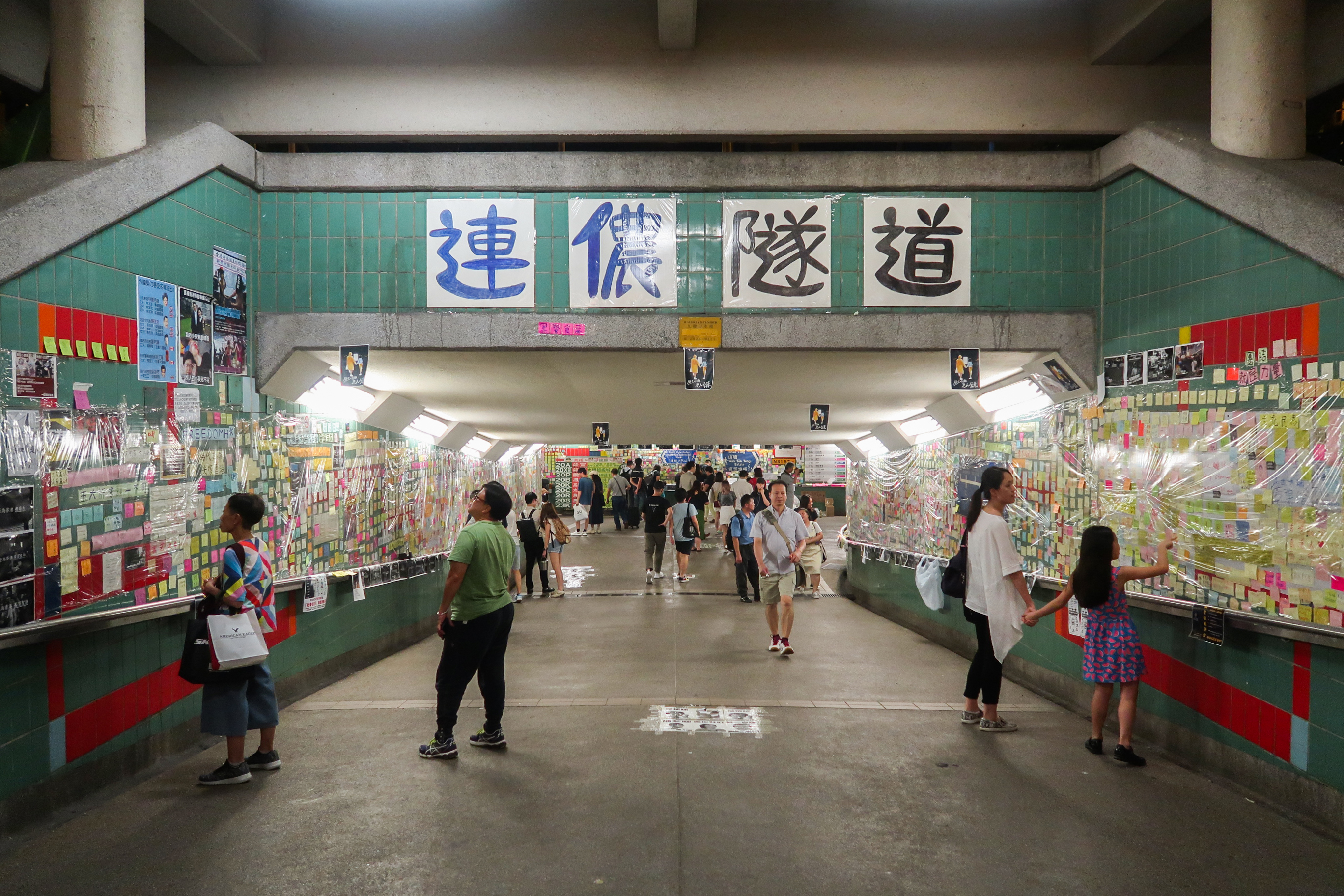 Tai Po Market Station underground tunnel Lennon Wall